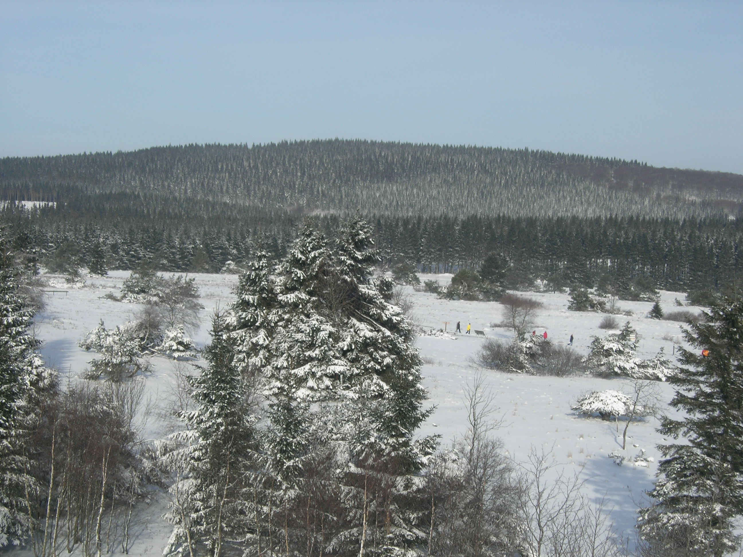 Blick auf den Langenberg im Winter vom Clemensberg. Im Bildvordergrund befindet sich das Naturschutzgebiet Neuer Hagen.